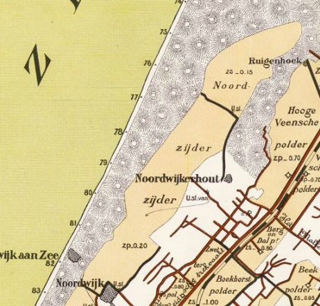 Noordzijder_polder